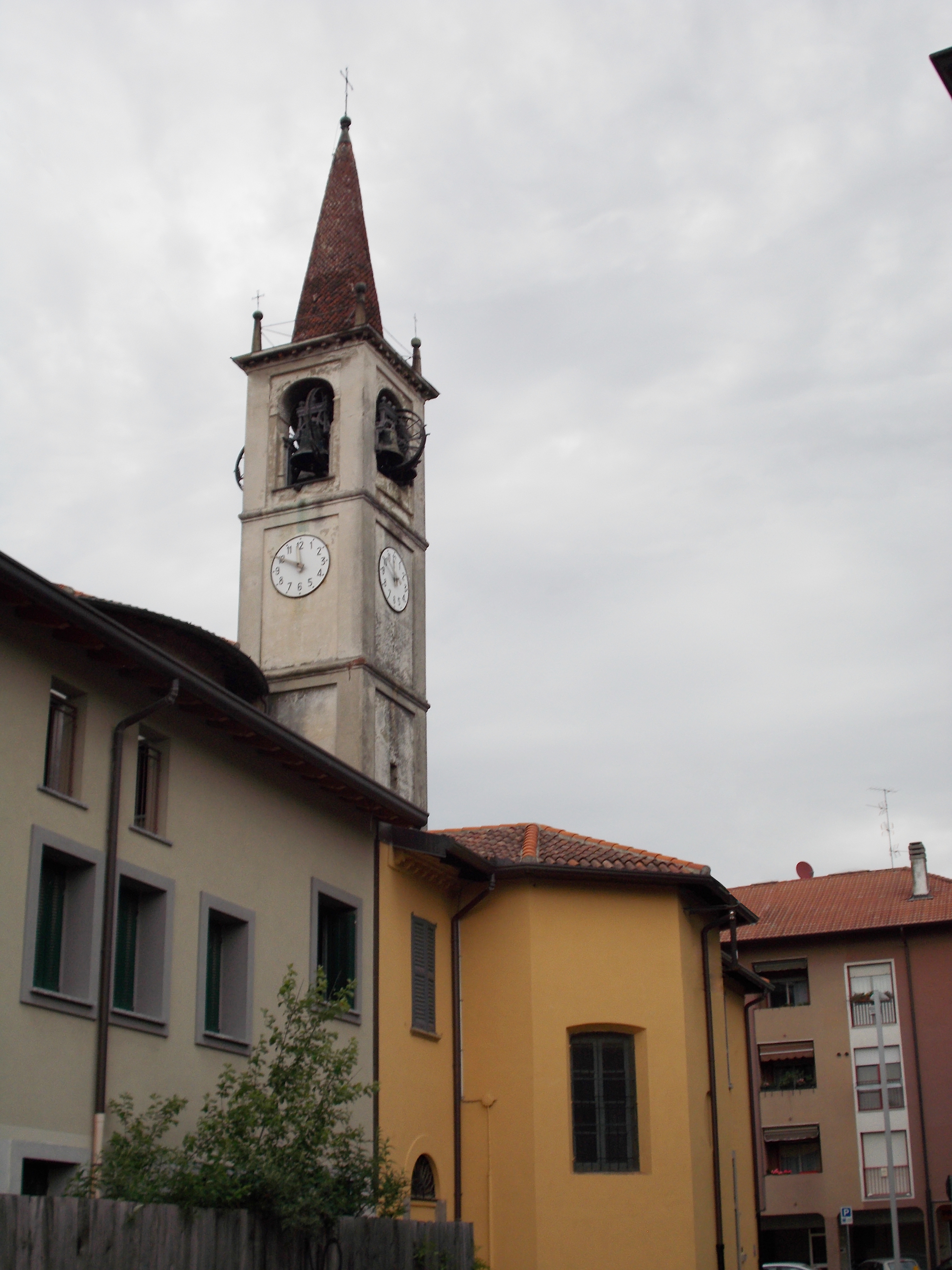 L'abside e il campanile della chiesa quattrocentesca di Carnate, ricostruita nell'Ottocento e dedicata ai Santi Cornelio e Cipriano